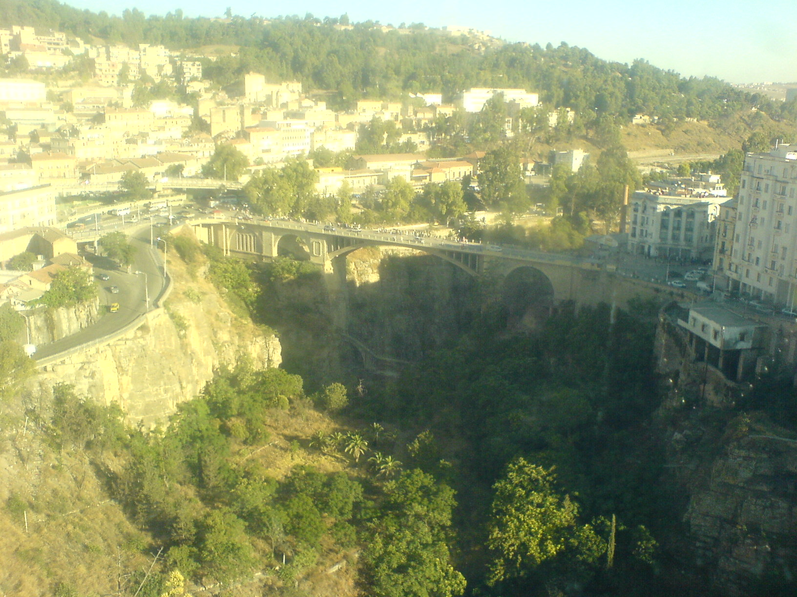 D'un coté de la télécabine, vous pouvez voir le pont de Sidi M'sid et de l'autre vous pouvez apprecier celui de Bab El Kantra à Constantine